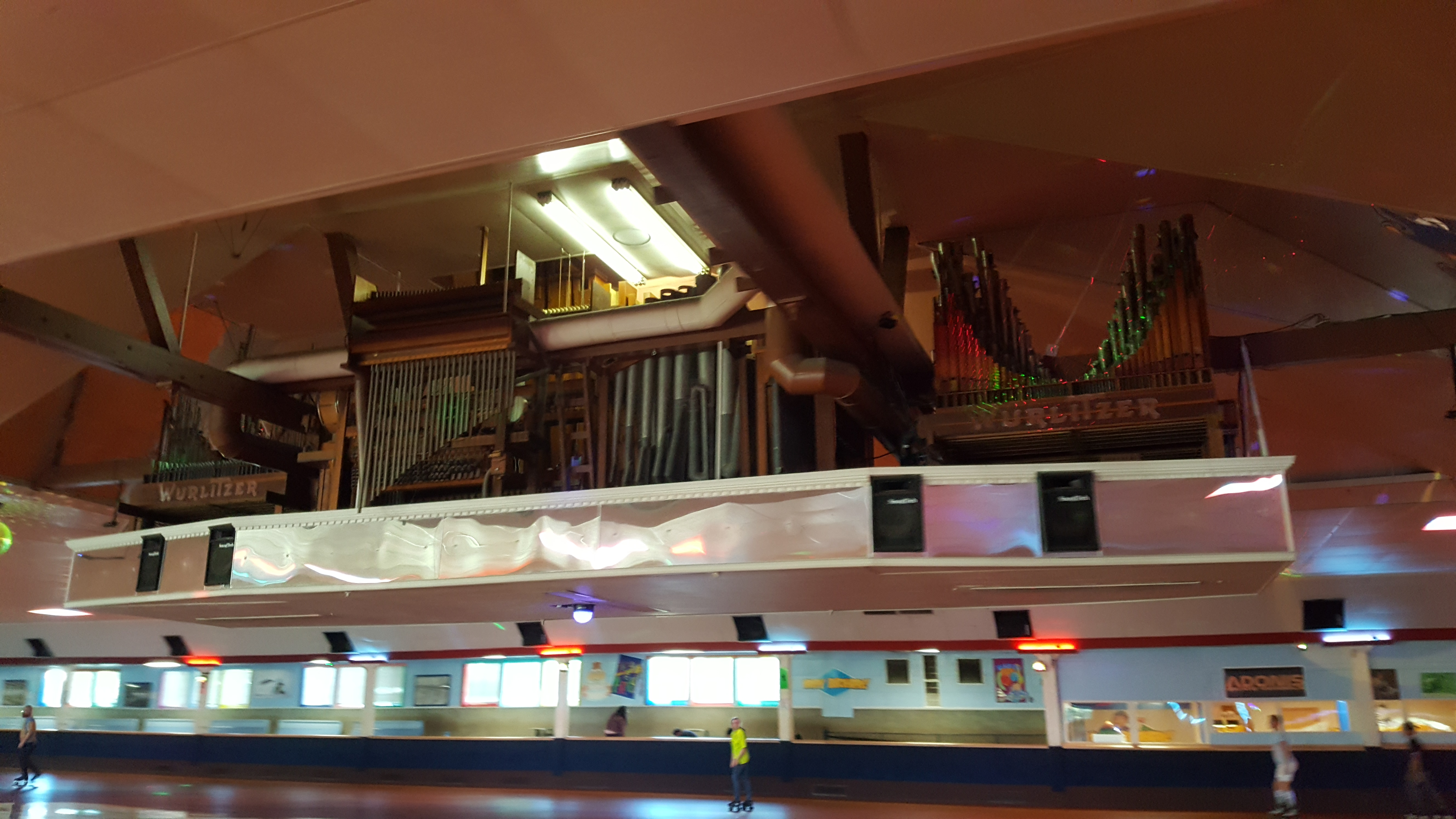 Oaks Amusement Park